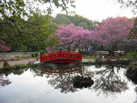 Foto de flor de cerejeira ("Sakura" em japonês). Cidade de Apucarana Takashina